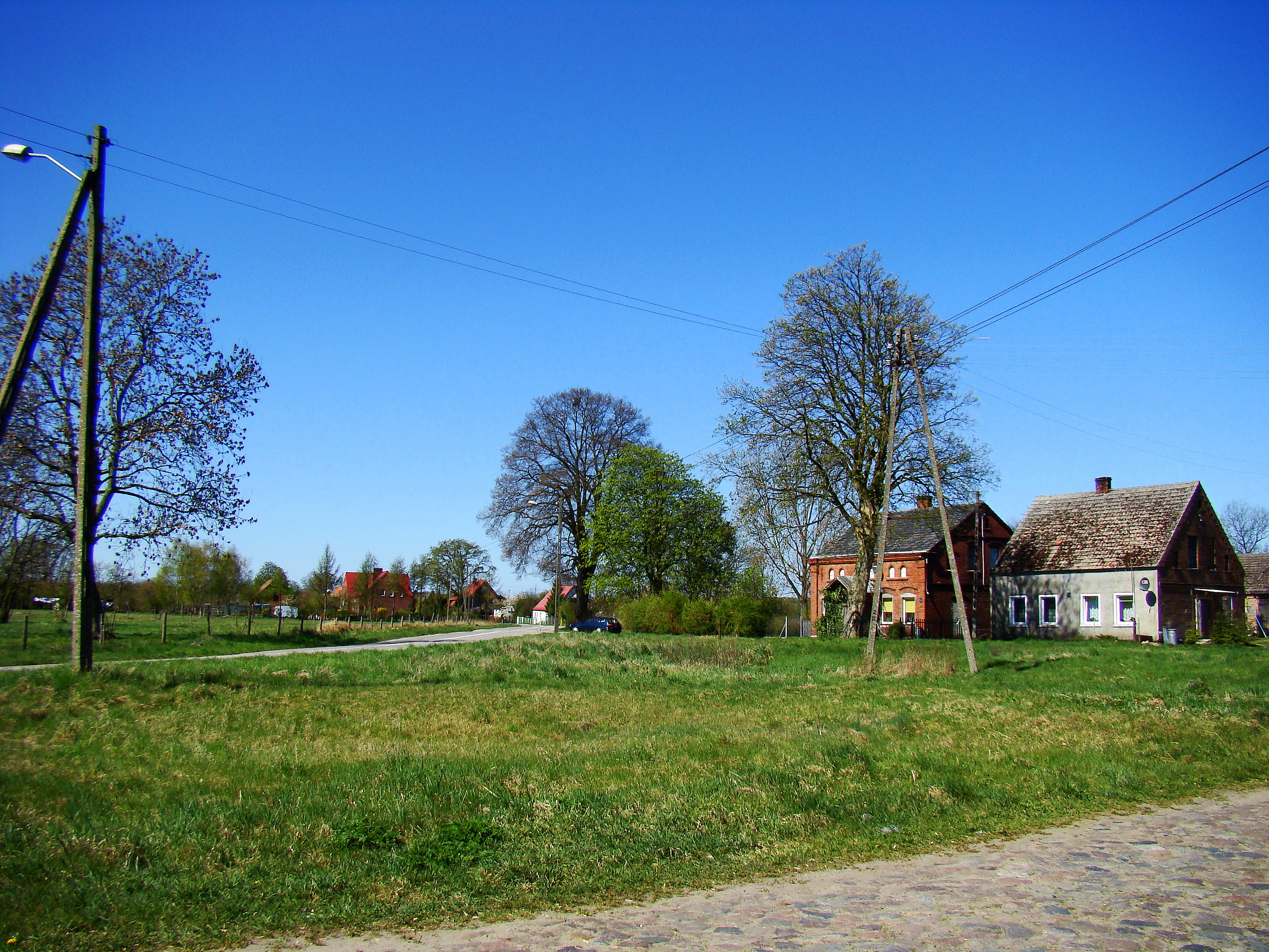 Warnołęka (Gmina Nowe Warpno, Województwo zachodniopomorskie), Polska